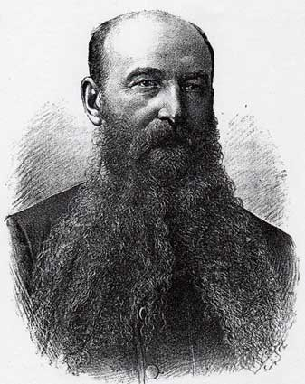 Иван Ястребов